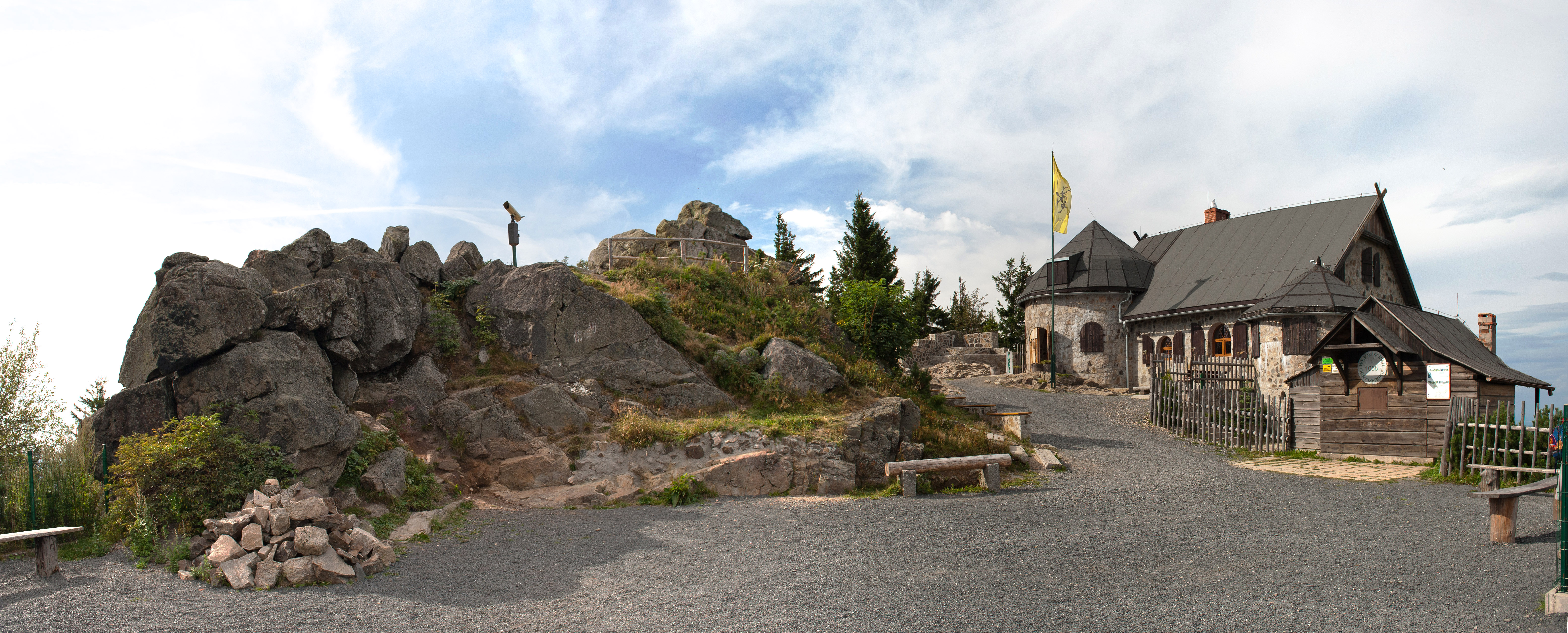 Wysoki Kamień, schronisko turystyczne w Górach Izerskich, 1058 m npm.